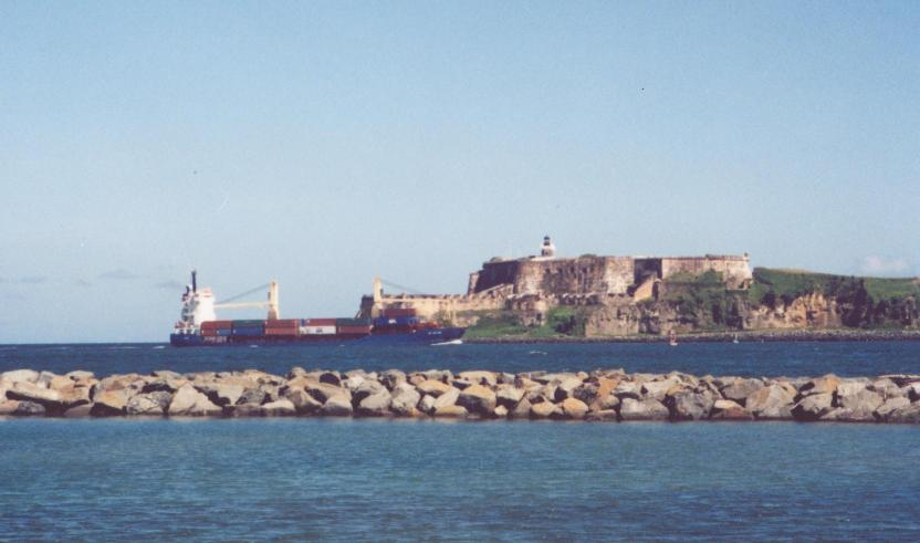 Vista de El Morro desde Isla de Cabras